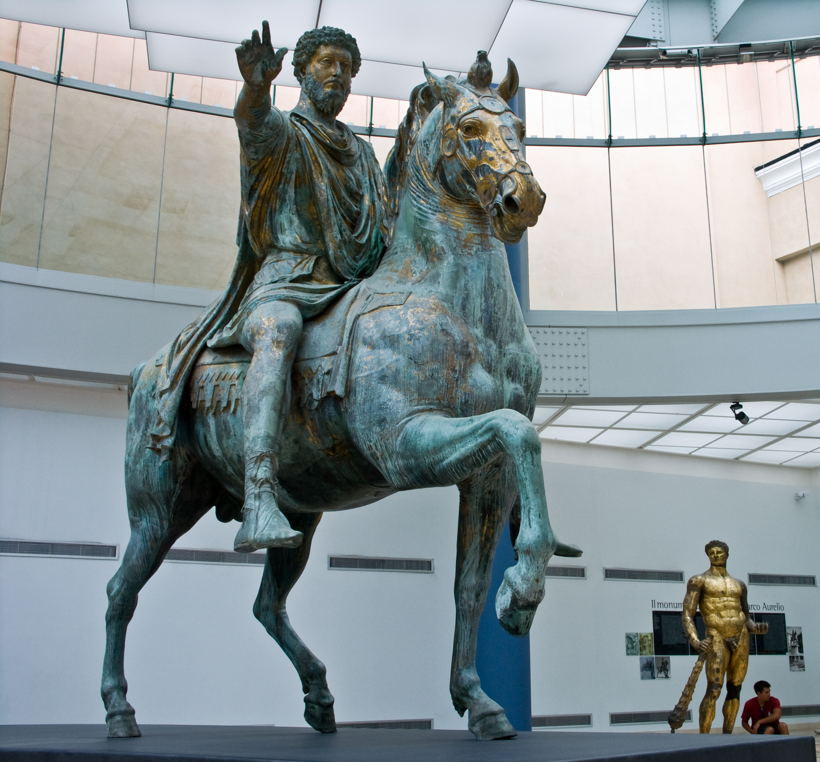 Bronze statue of Marcus-Aurelius, Musei Capitolini